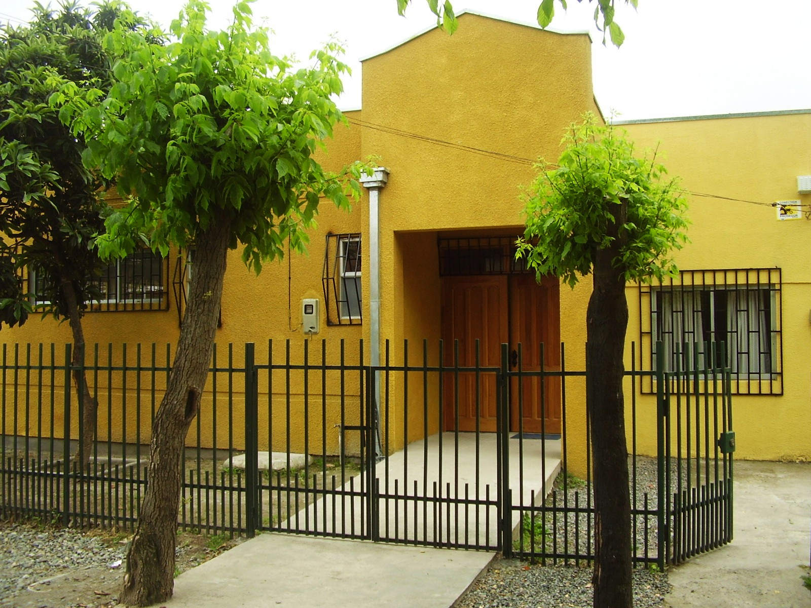 Entrada Biblioteca